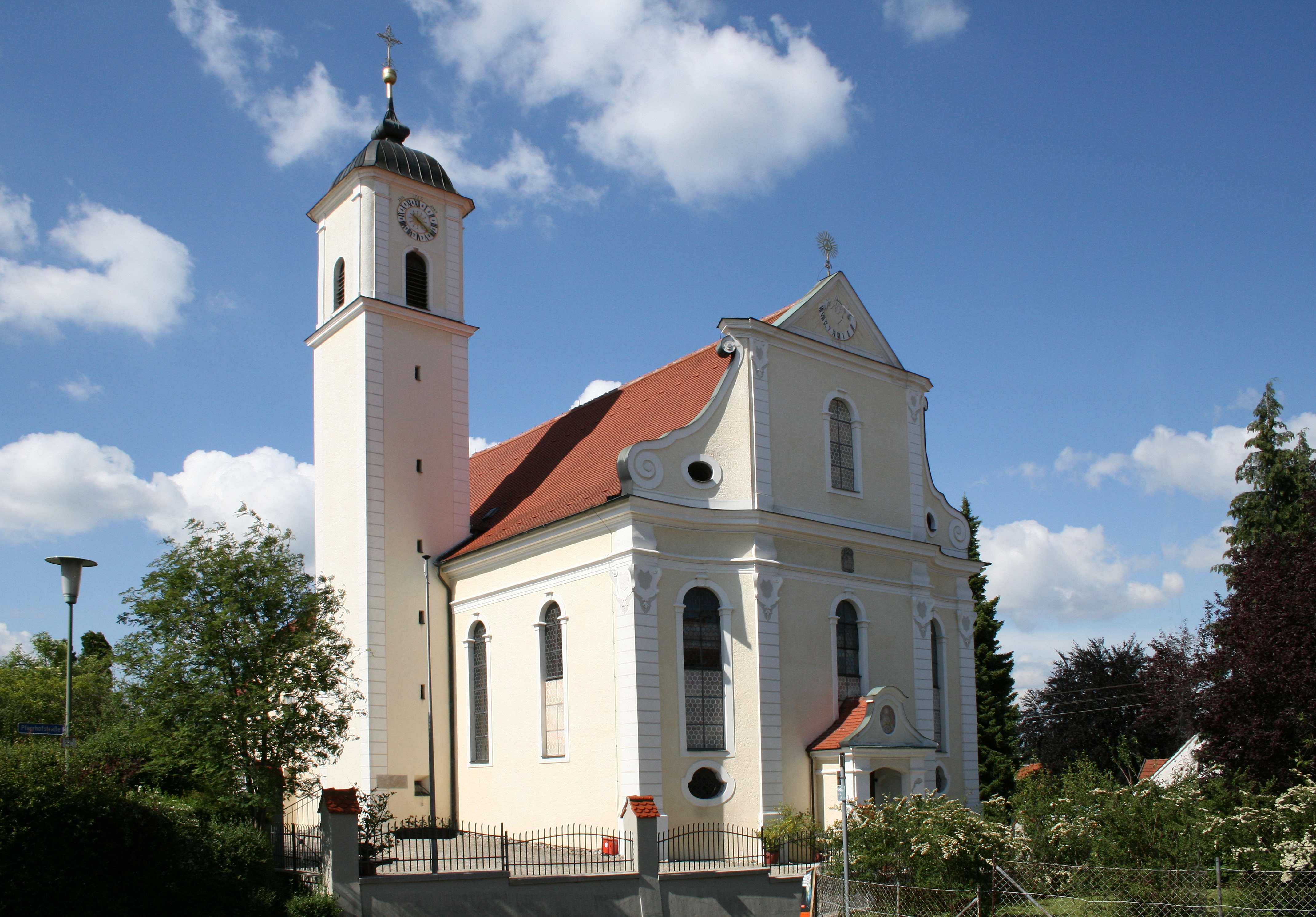 St. Ulrich, Amendingen, Außenansicht